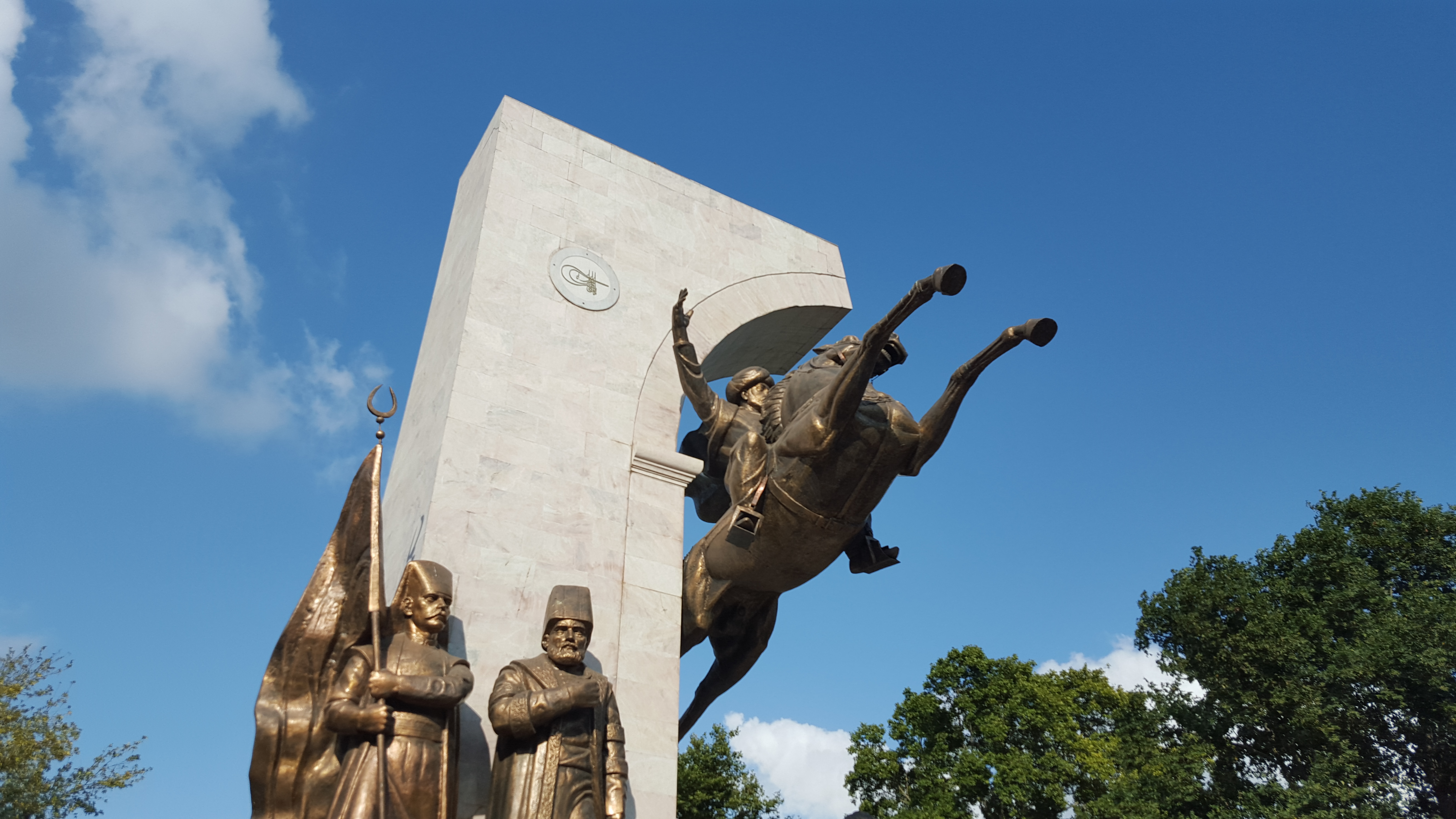 פסל לזכרו של הסולטאן מהמט השני, כובש איסטנבול